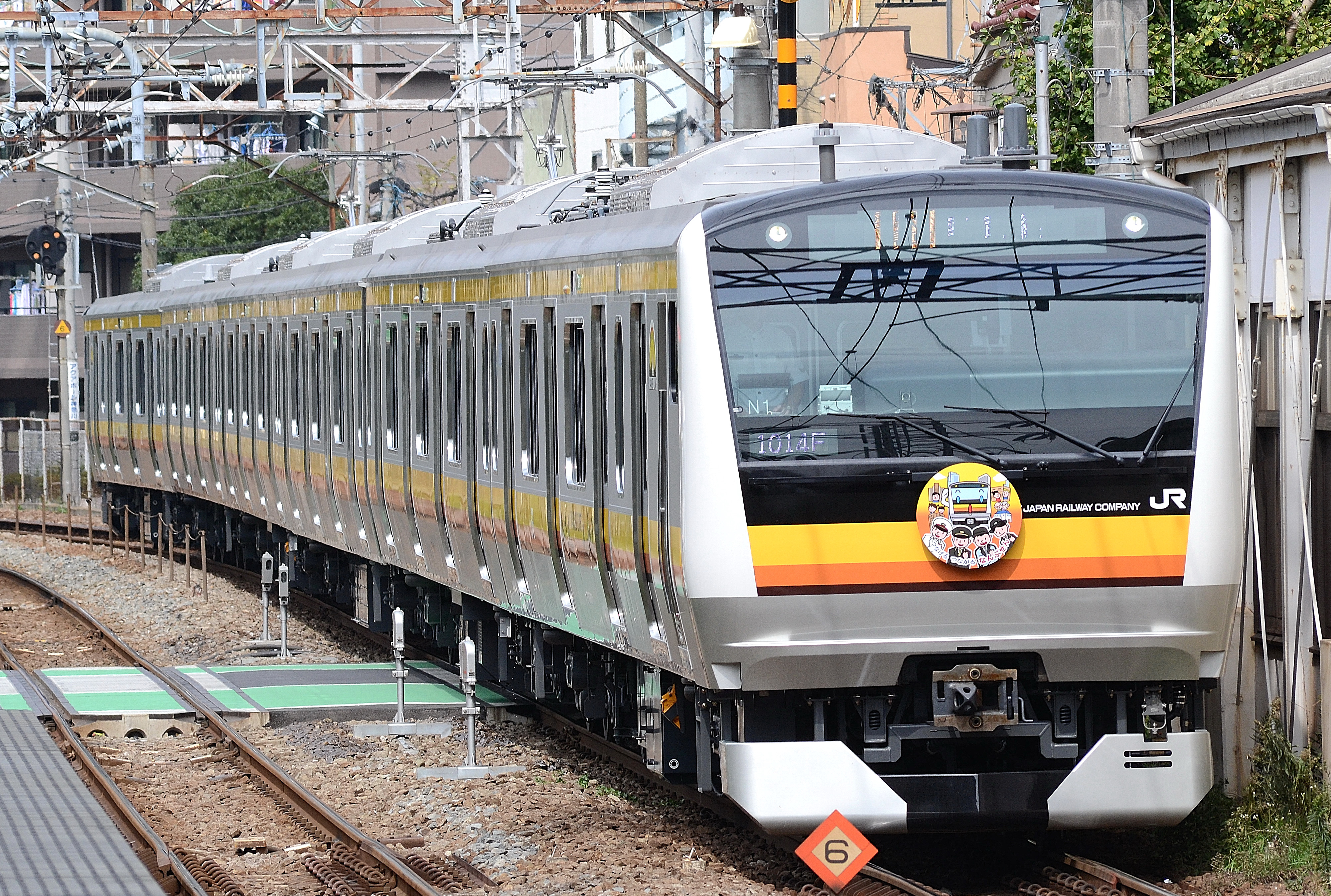 南武線、武蔵小杉-向河原間を走行する、営業運転を開始したE233系8000番台N1編成（向河原駅ホームから撮影）